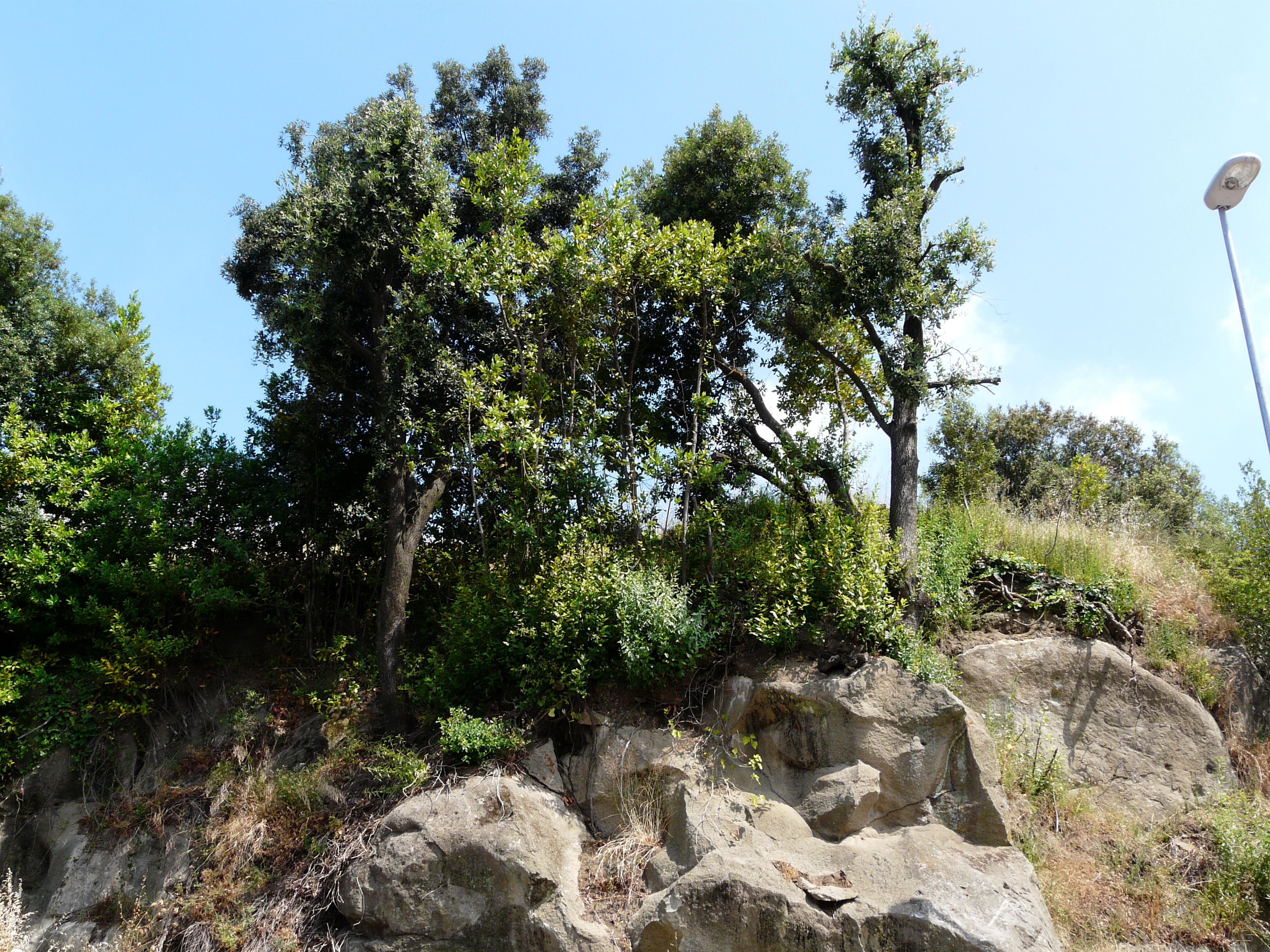 Marino, natura e peperino